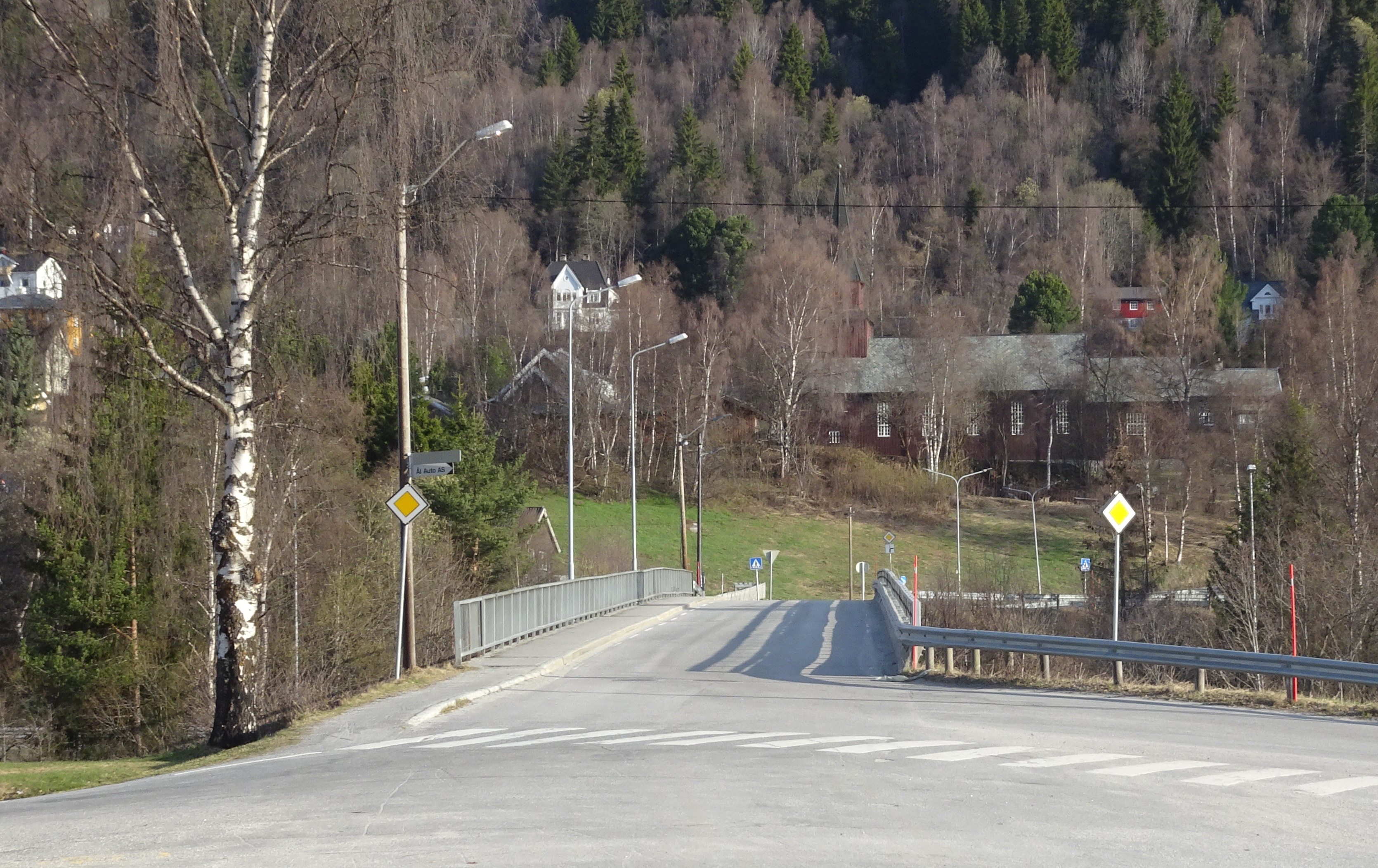 Helsetunvegen (fylkesvei 245) nord for Ål stasjon